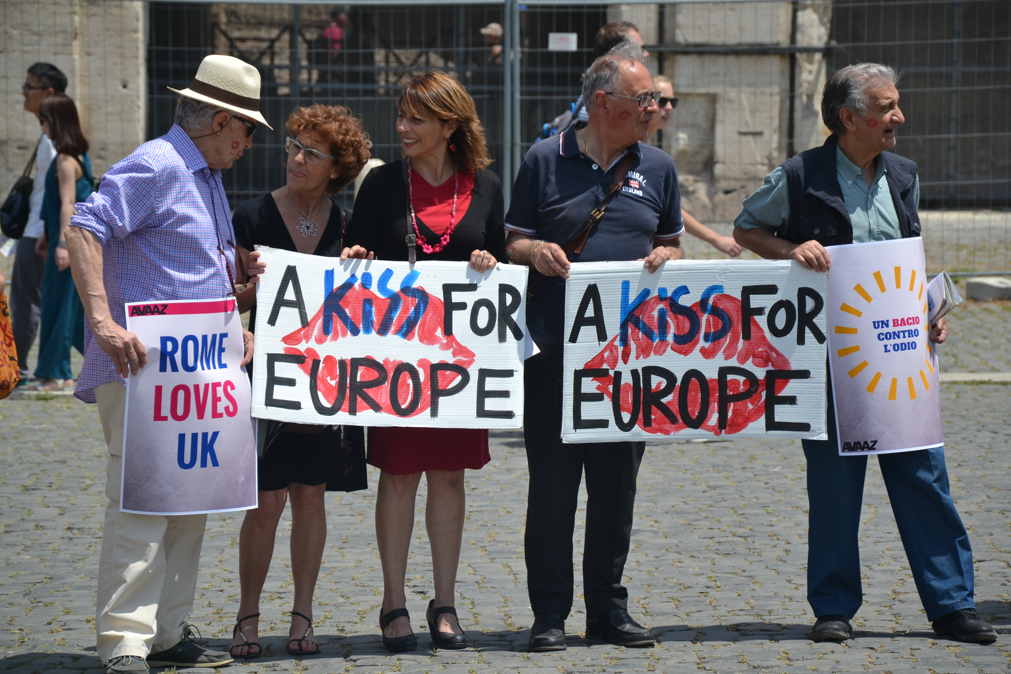 Manifestation anti-Brexit à Rome.